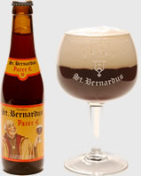 Пиво бельгии